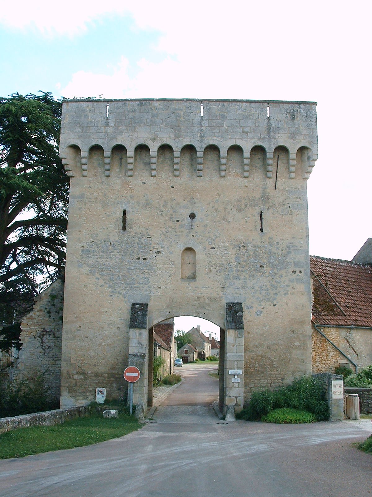 Château-fort de Druyes-les-belles-Fontaines, Yonne) - la porte du bourg